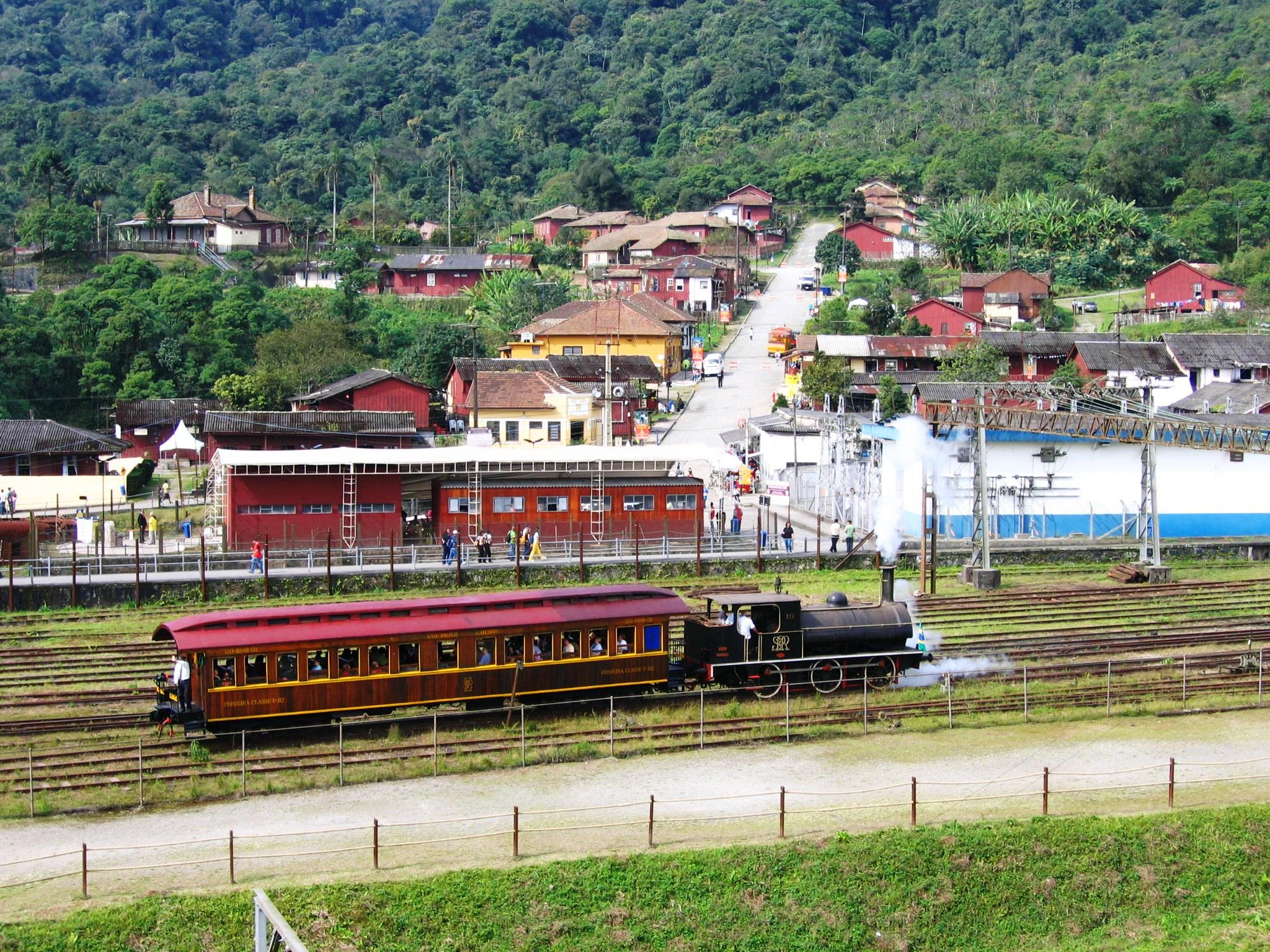 Locomotiva a vapor com finalidade turística operando em um curto trecho na vila de Paranapiacaba, no município de Santo André